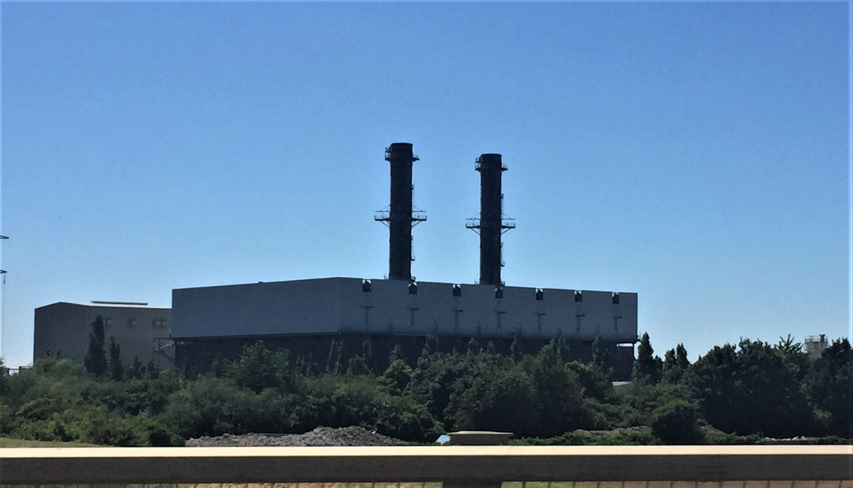 Gamtinių dujų elektrinė Spoldinge, Linklonšyre